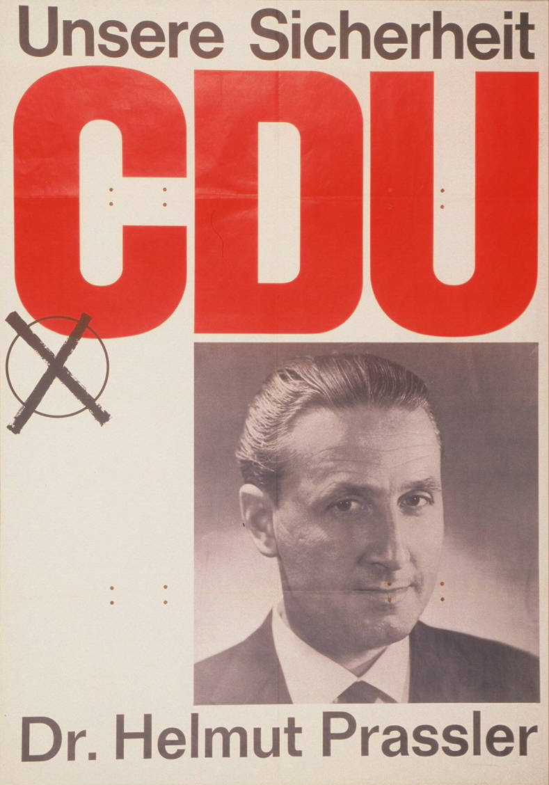 Unsere Sicherheit CDU Dr. Helmut PrasslerAbbildung:Porträtfoto - StimmkreuzPlakatart:Kandidaten-/Personenplakat mit PorträtAuftraggeber:CDU BonnDrucker_Druckart_Druckort:KVD KölnObjekt-Signatur:10-001: 1164Bestand:Plakate zu Bundestagswahlen (10-001)GliederungBestand10-18:Plakate zu Bundestagswahlen (10-001) » Die 5. Bundestagswahl am 19. September 1965 » CDU » Mit PorträtfotoLizenz:KAS/ACDP 10-001: 1164 CC-BY-SA 3.0 DE